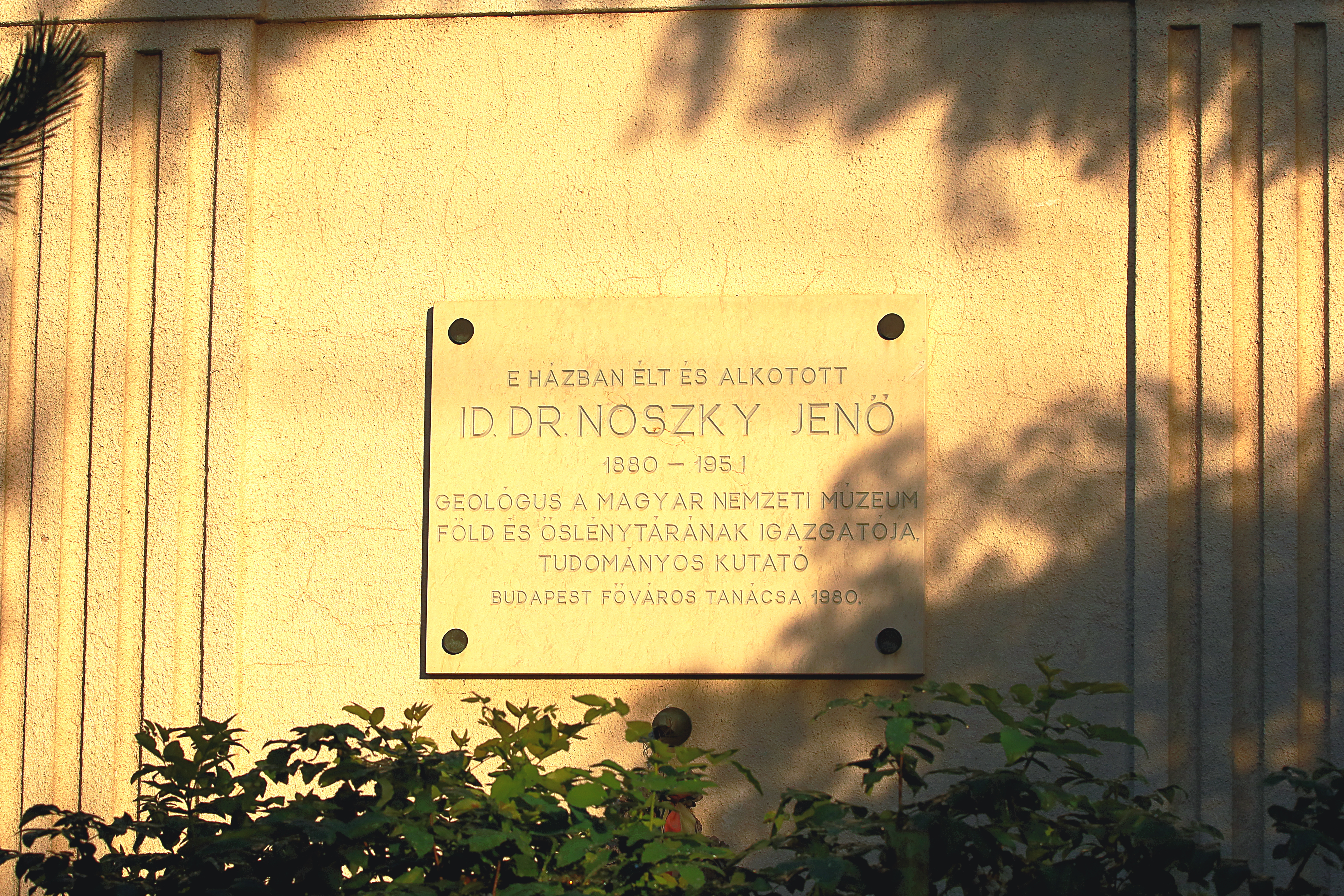 Id. dr. Noszky Jenő geológus emléktáblája, Könyvtár u. 5 (Budapest, Sashalom, 1163)